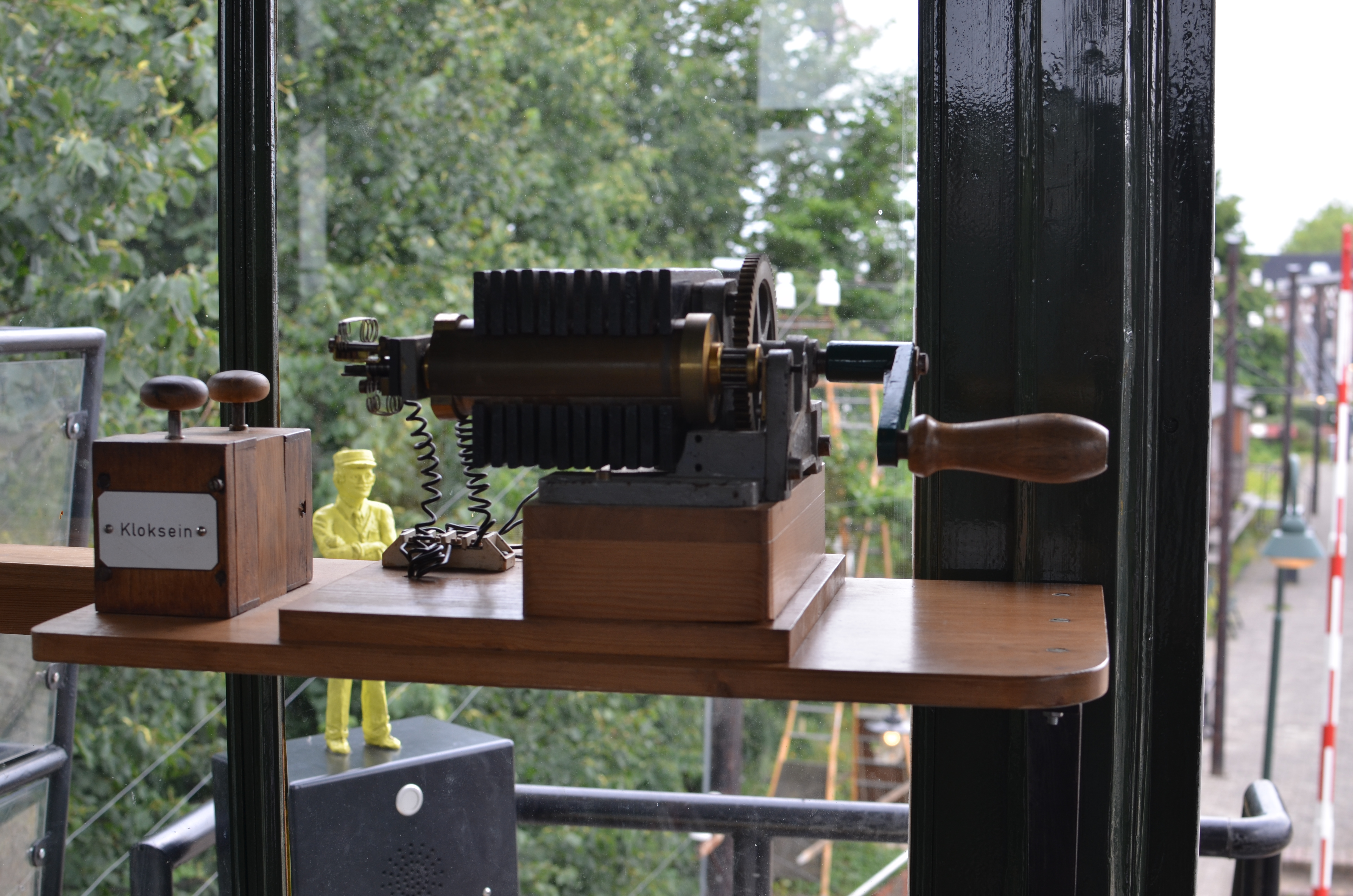 Een kloksein in een seinhuis op het terrein van het Spoorwegmuseum.